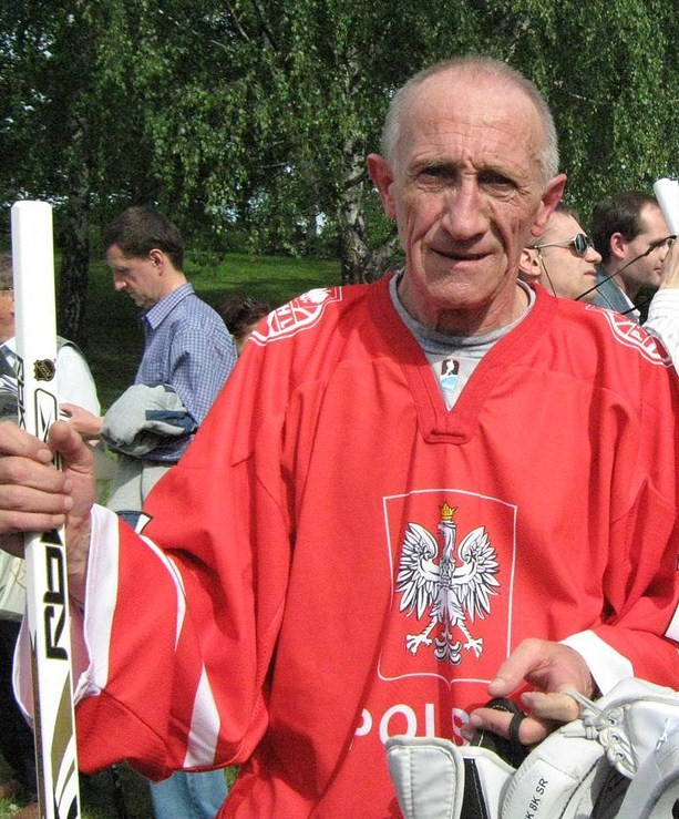 Andrzej Tkacz